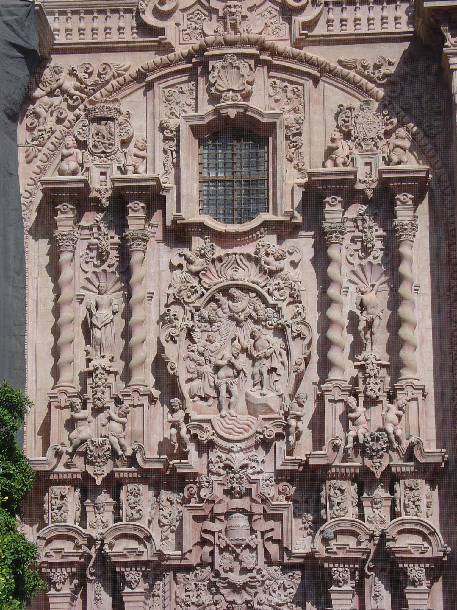 Detalle de la fachada de Santa Prisca